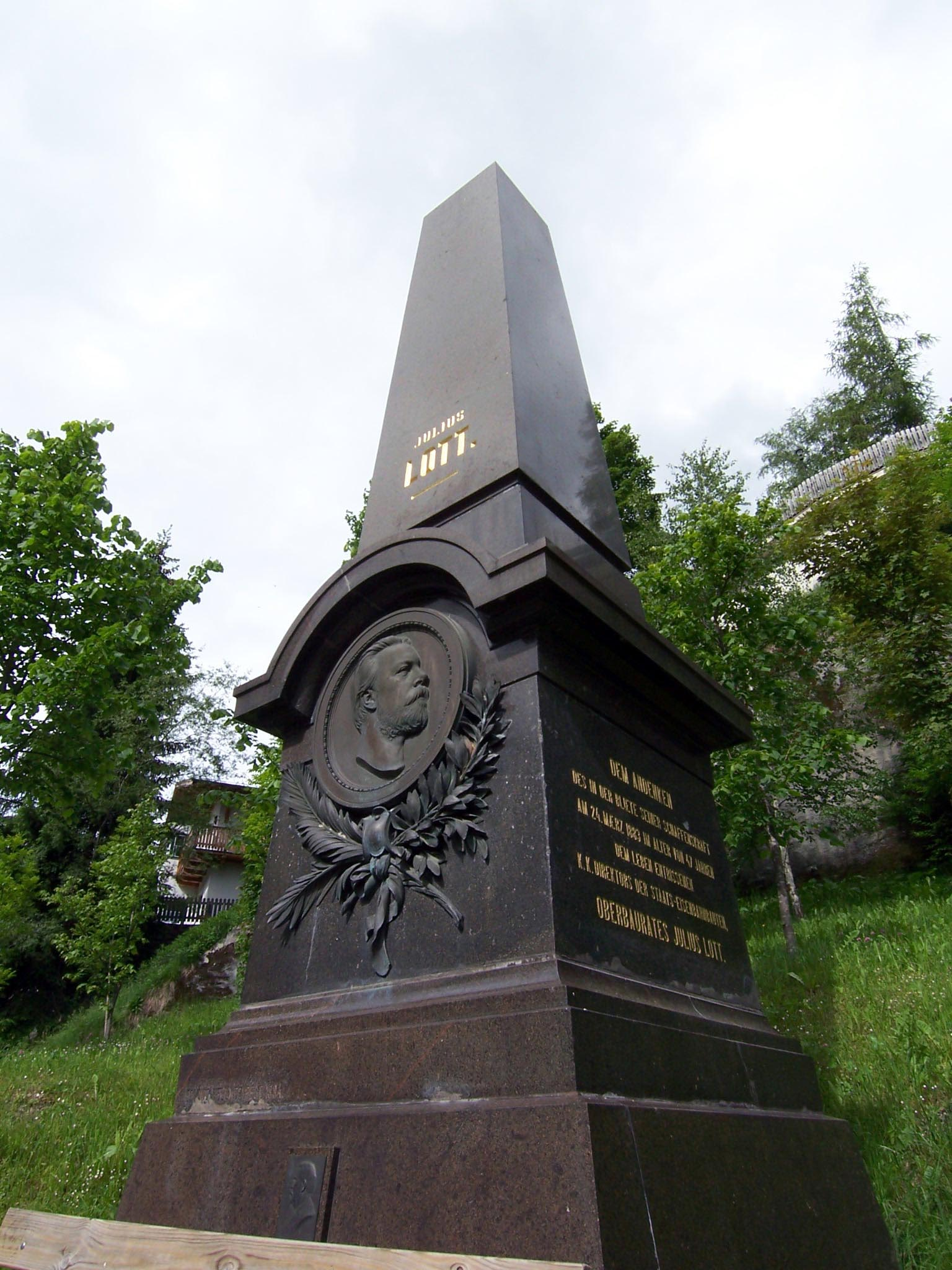 Denkmal für Julius Lott in St. Anton am Arlberg, neben dem ehemaligen Tunnelportal This media shows the remarkable cultural object in the Austrian state of Tyrol listed by the Tyrolean Art Cadastre with the ID 47260. (on tirisMaps, pdf, more images on Commons, Wikidata)